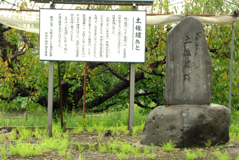 蜷川親世（親俊）の墓。土佐壇と呼ばれる。